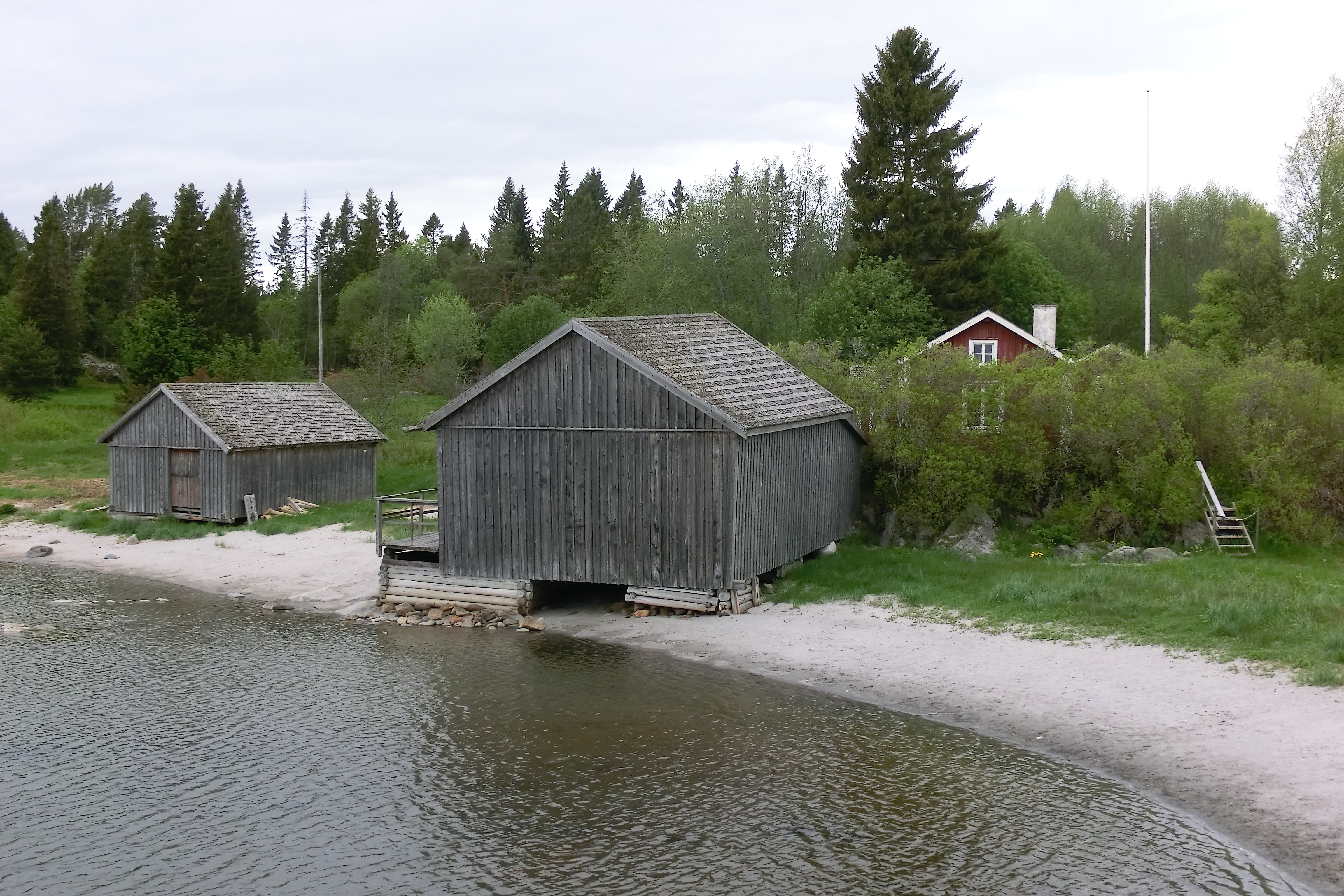 Skeppshamn, Åstön naturreservat, Timrå kommun